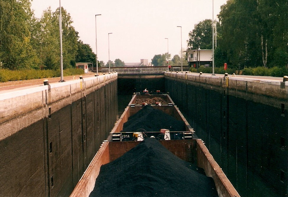 Schubverband in der Schleuse Zerben Elbe-Havel-Kanal Juli 1998 Blickrichtung Osten